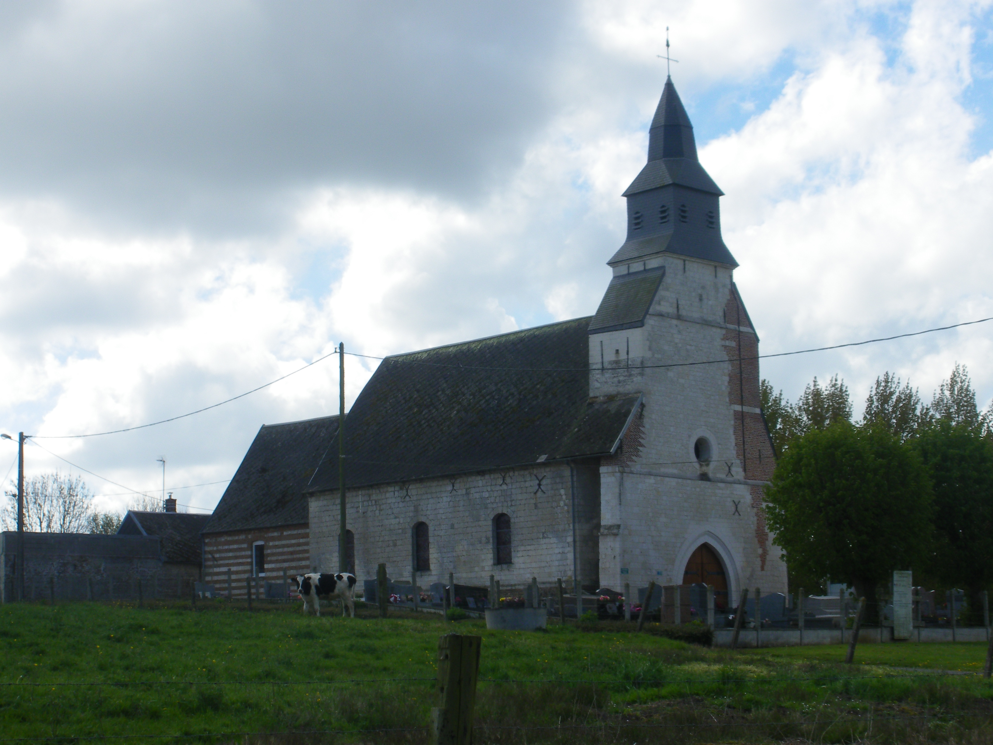 Vue de l'église Saint-Nicolas de Coullemont.